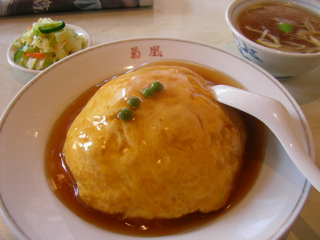 天津には天津飯はないらしい。